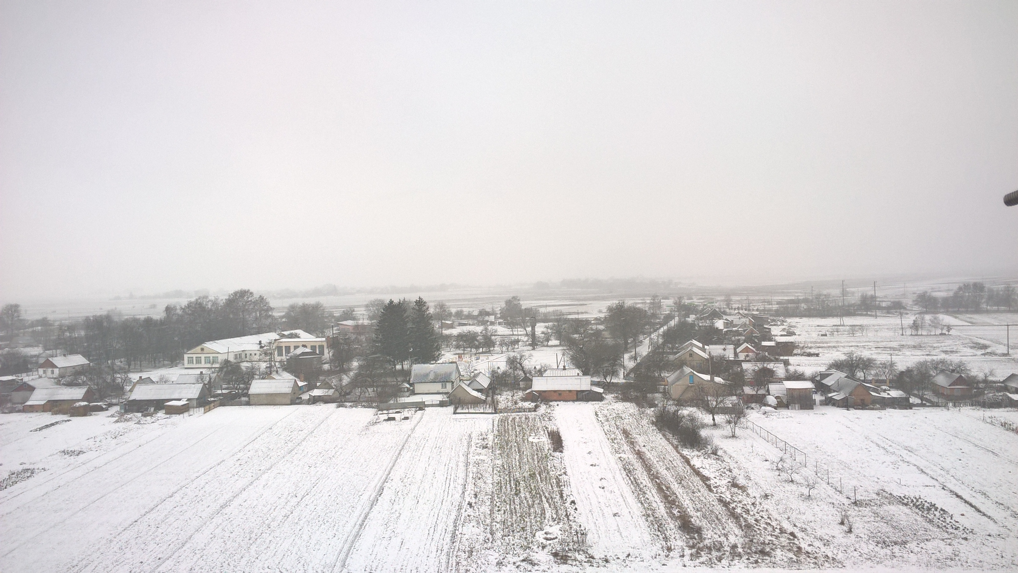 Вид на село з вежі мобільного звязку. View of the village from the tower of mobile communication.